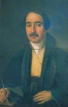 Zugravul de biserici Nicolae Teodorescu (1785-1880) - autoportret